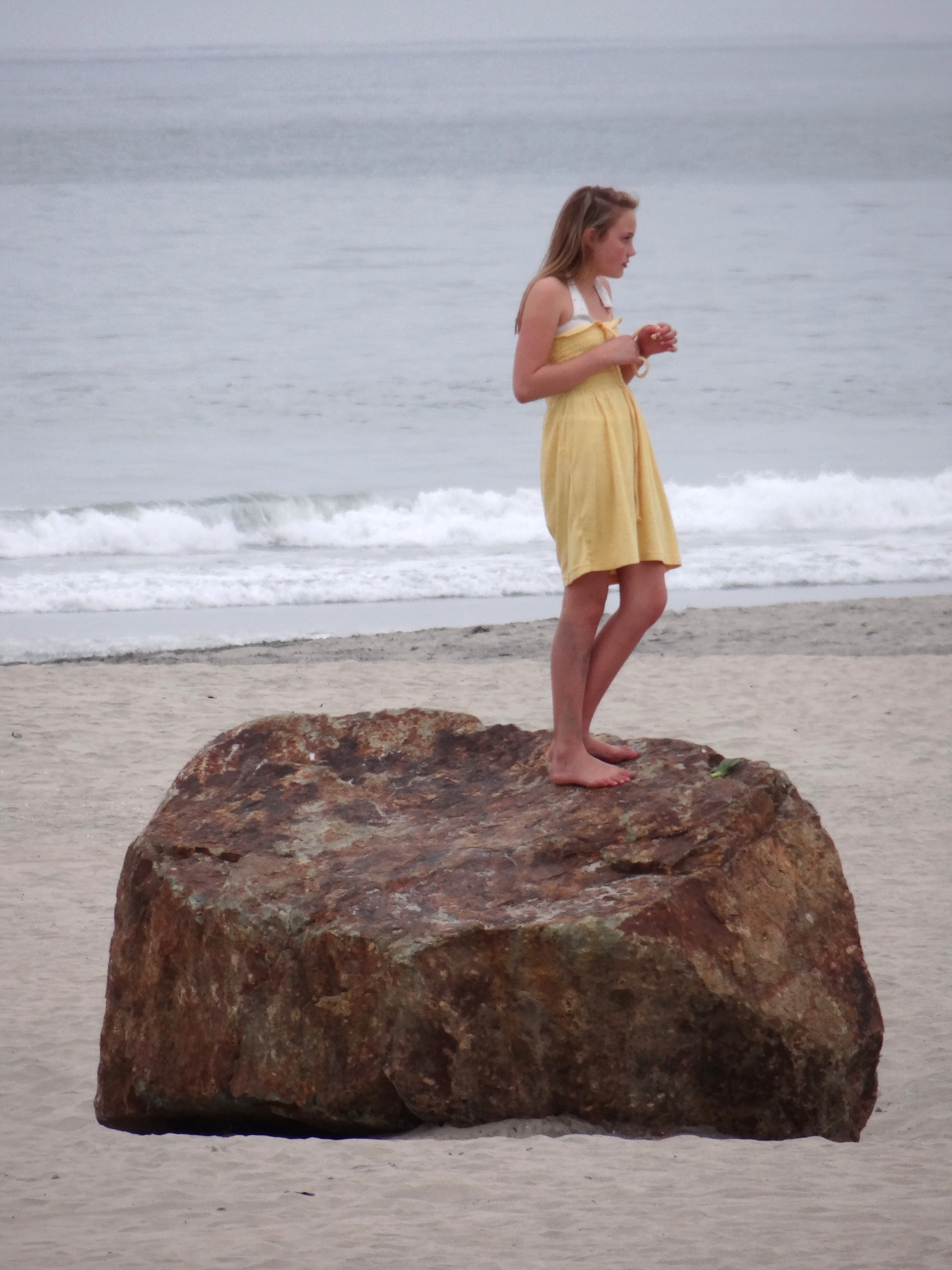 Adolescent Girl on Municipal Beach - Coronado - San Diego, CA - USA